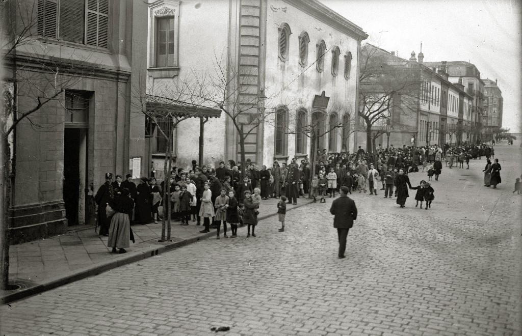 Título original: Alameda del Boulevard (1/1) Localización: San Sebastián (Guipúzcoa)